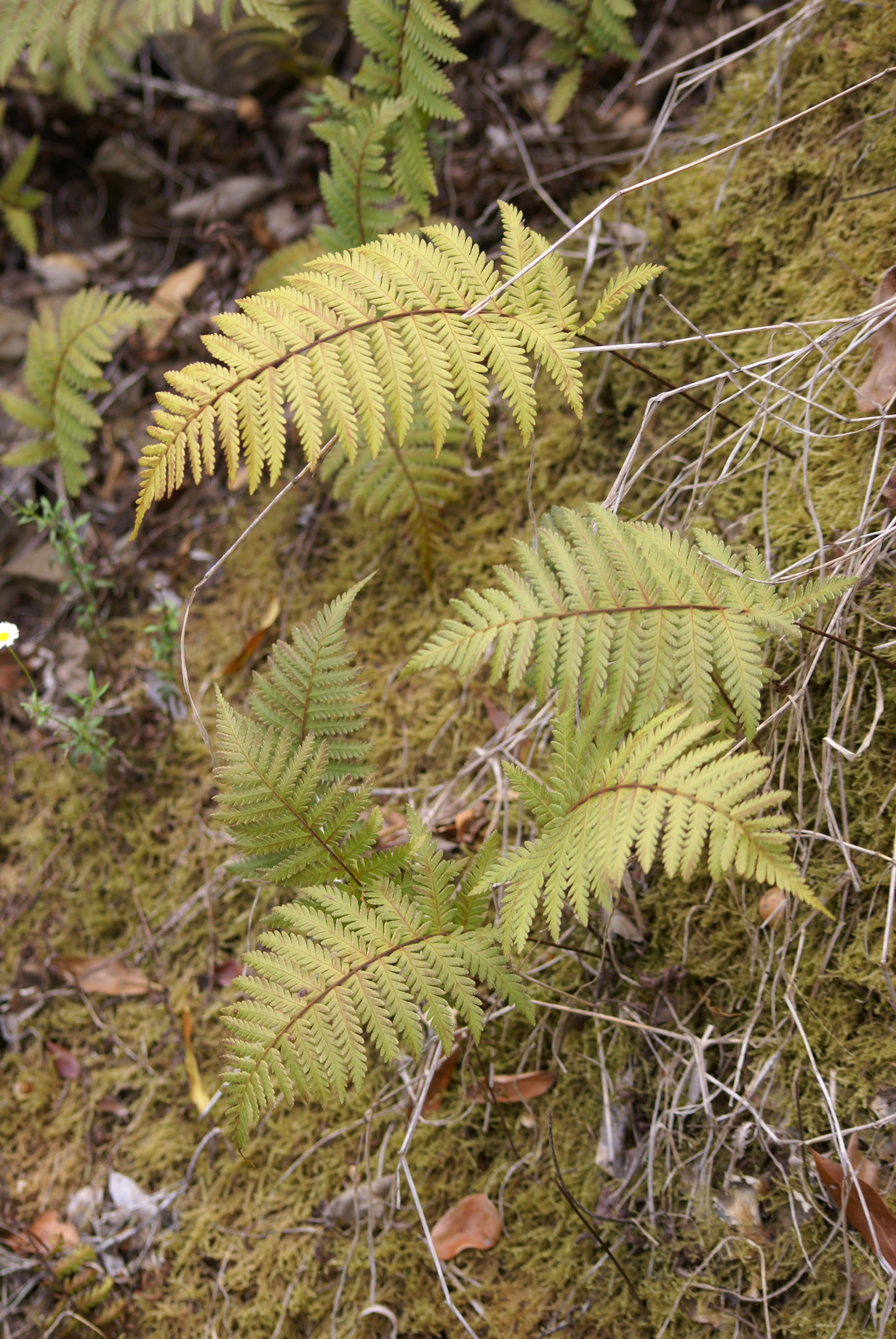 Arthropteris orientalis ( Cilaos )